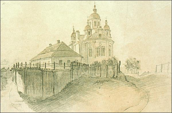 Будинок Івана Котляревського в Полтаві. Робота Тараса Шевченка, 1845.: Будинок Івана Котляревського в Полтаві. Робота Тараса Шевченка, 1845 рік. Дід автора ”Енеїди” та ”Наталки Полтавки” був дияконом Успенської соборної церкви — її видно на малюнку. Він і поставив хату на горі за нею. На сволоку написав: ”Создася дом сей року 1705”. Тут поет прожив усе життя. Поруч, під горою, колись жила напівлегендарна Маруся Чурай